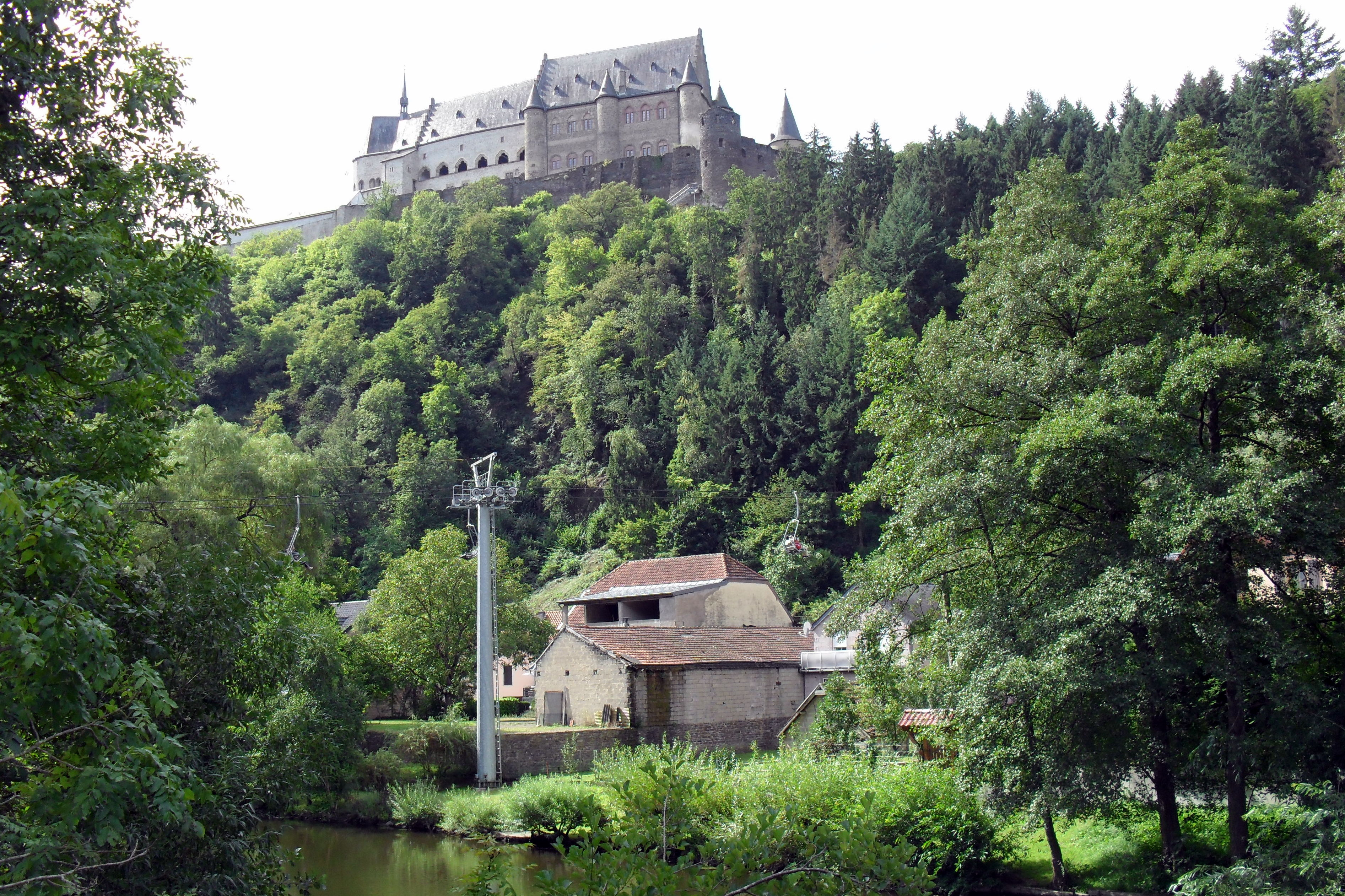 Télésiège de Vianden : passage au dessus de la rivière Our, un affluent de la Sûre et vue sur le château